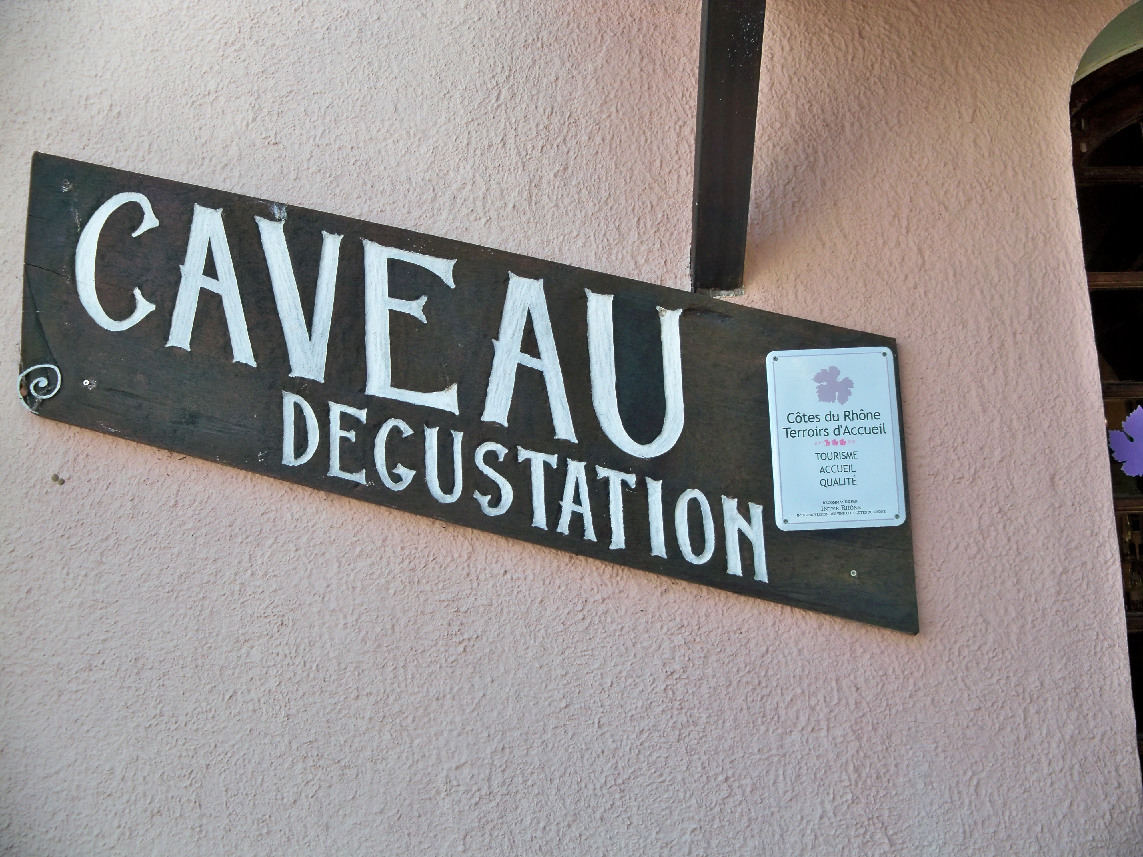 Acceuil des Caves de Côtes du Rhône